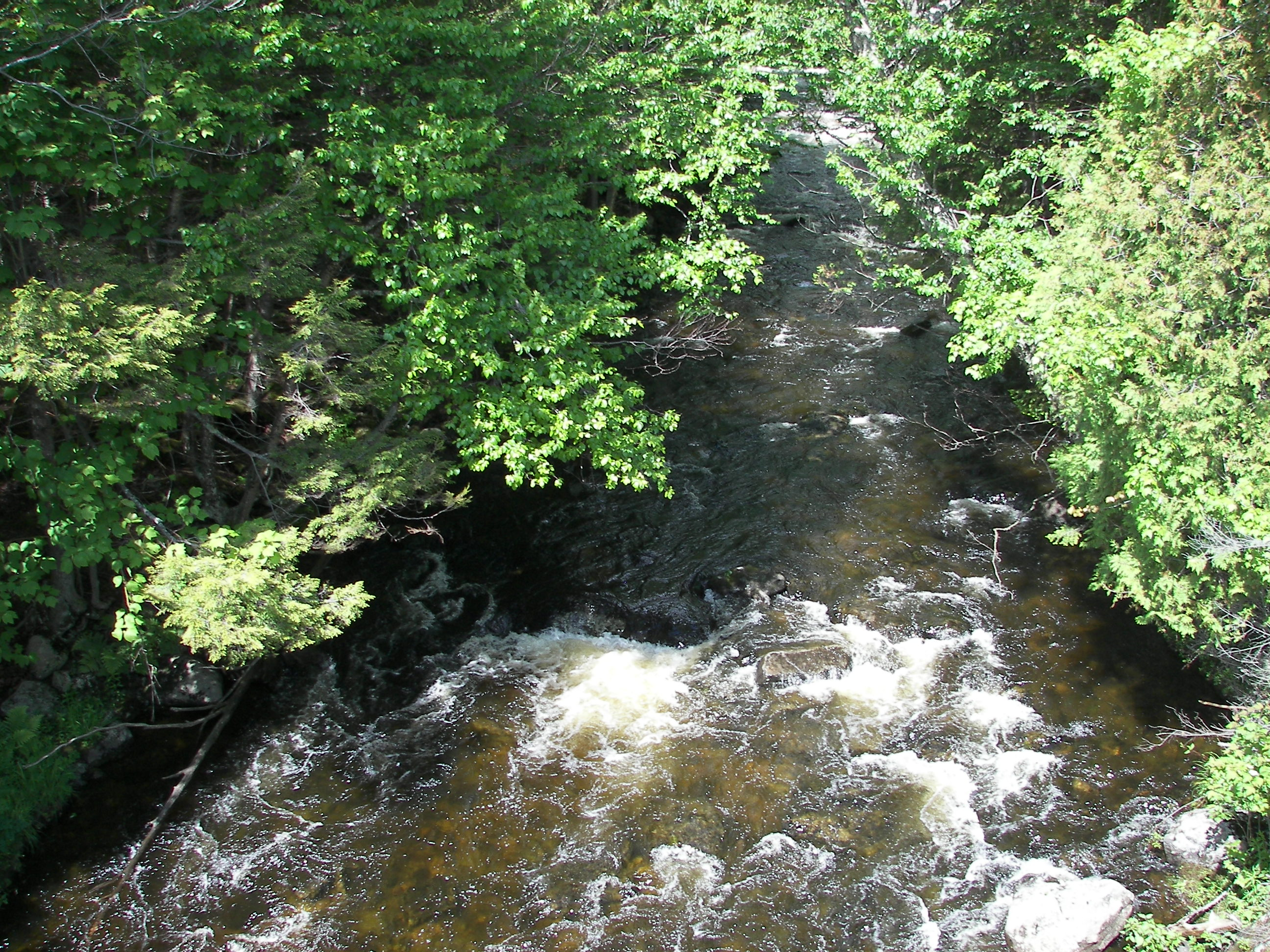 Riviere aux Araignées